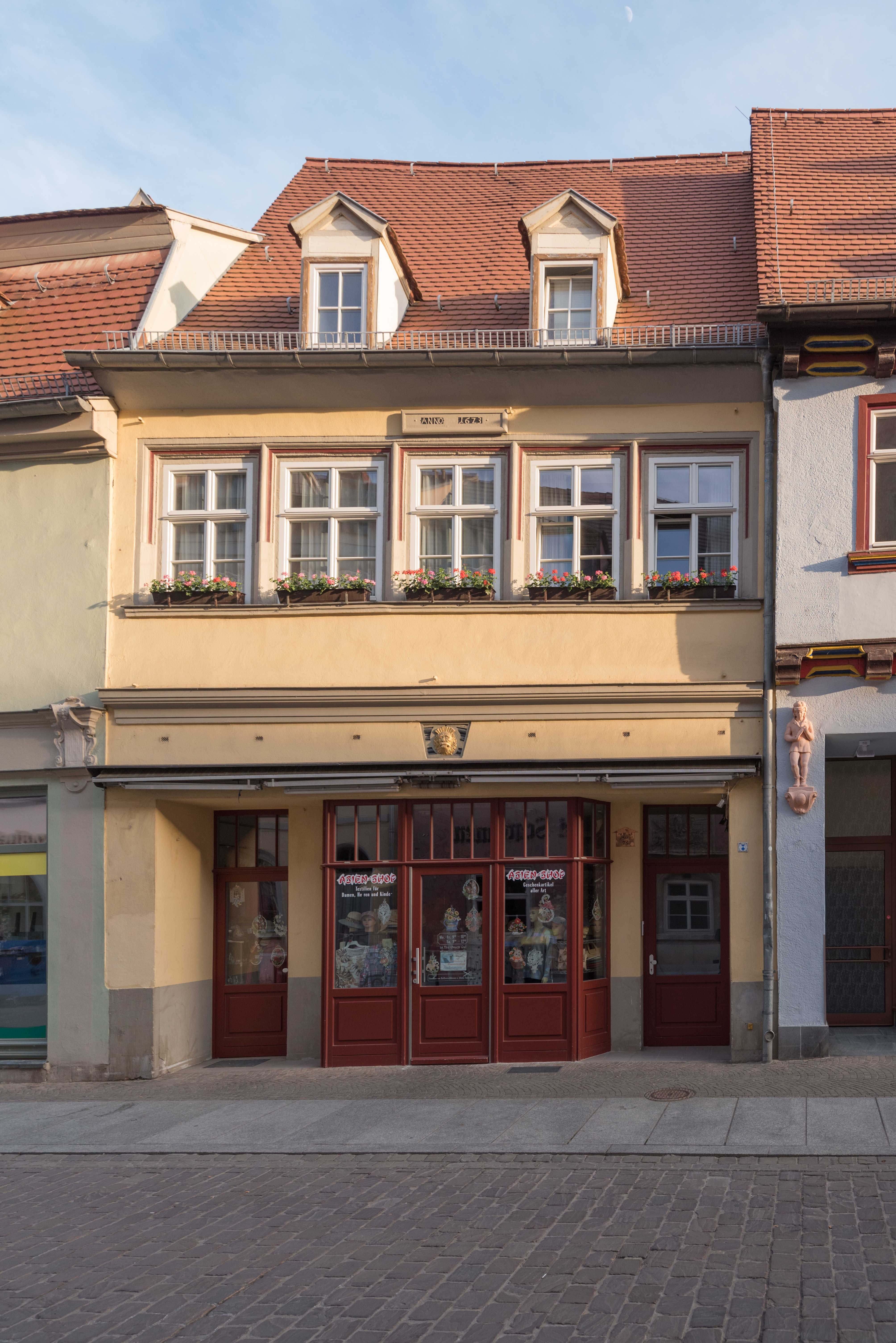 Naumburg (Saale), Jakobstraße 13